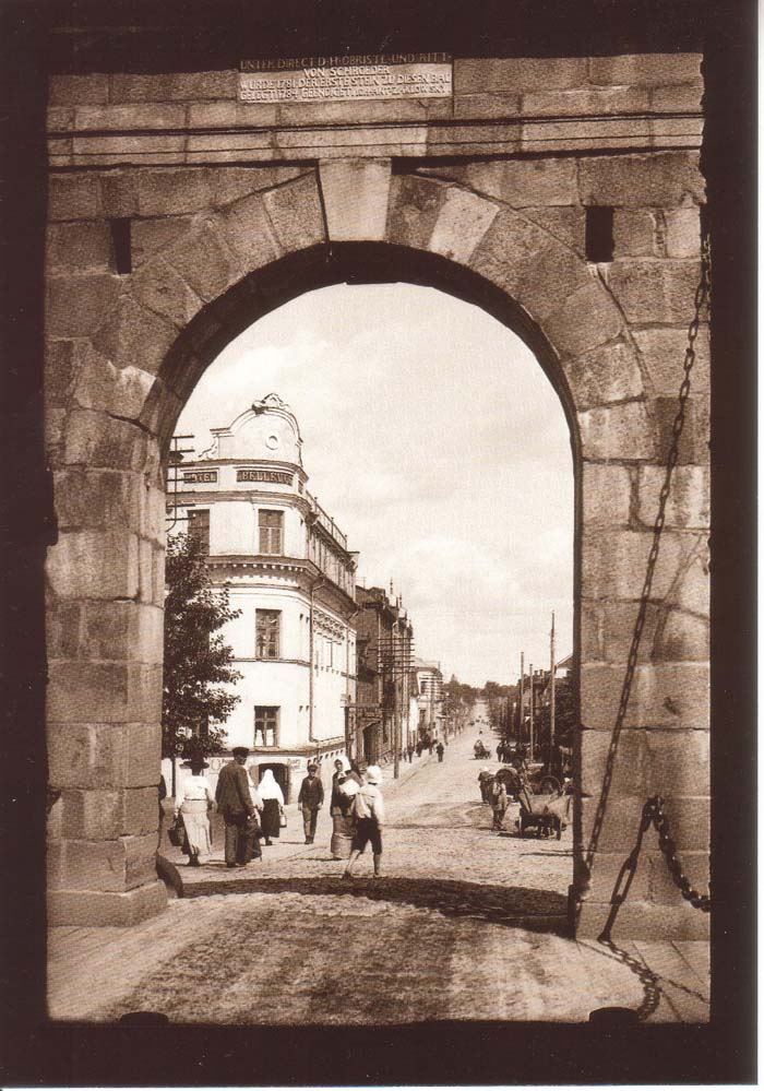 Raatuse tänav Kivisillalt vaadates u 1911